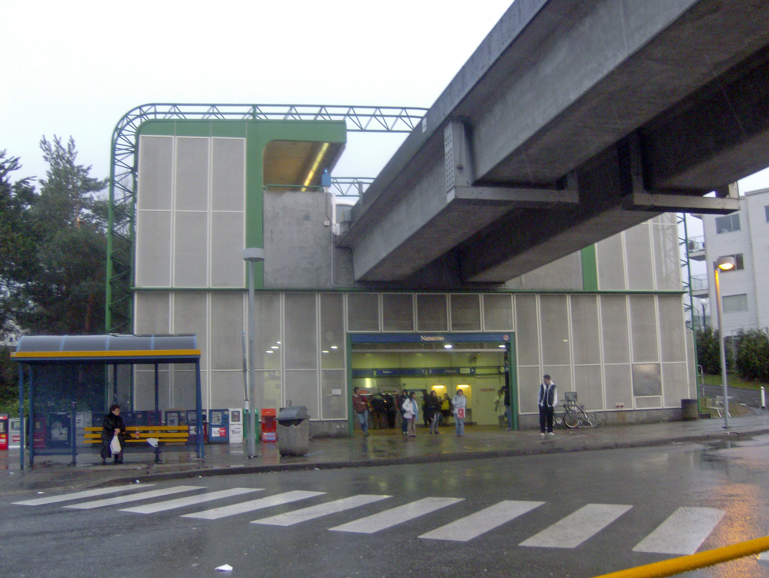 Nanaimo Station